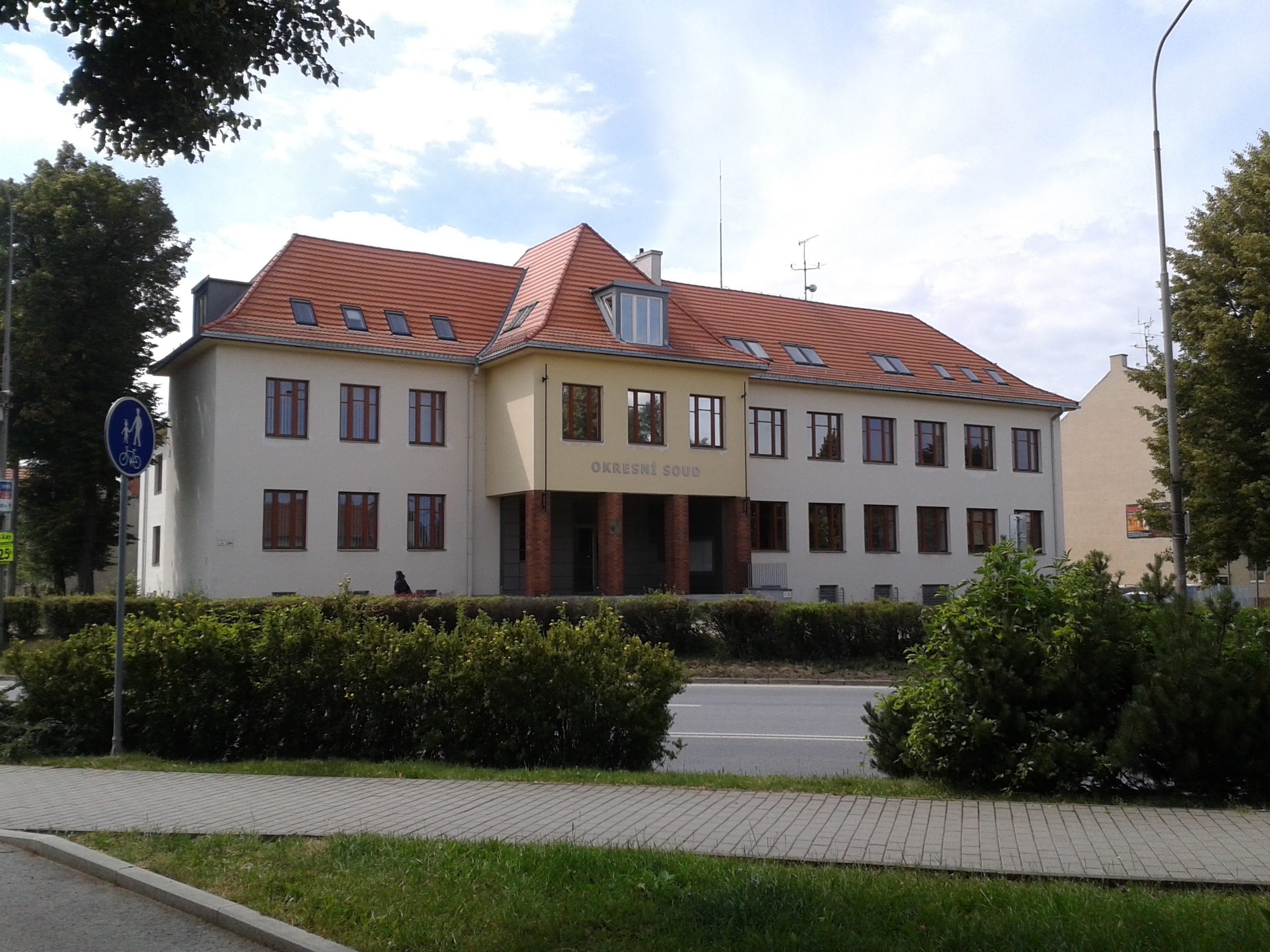 Okresní soud Vyškov